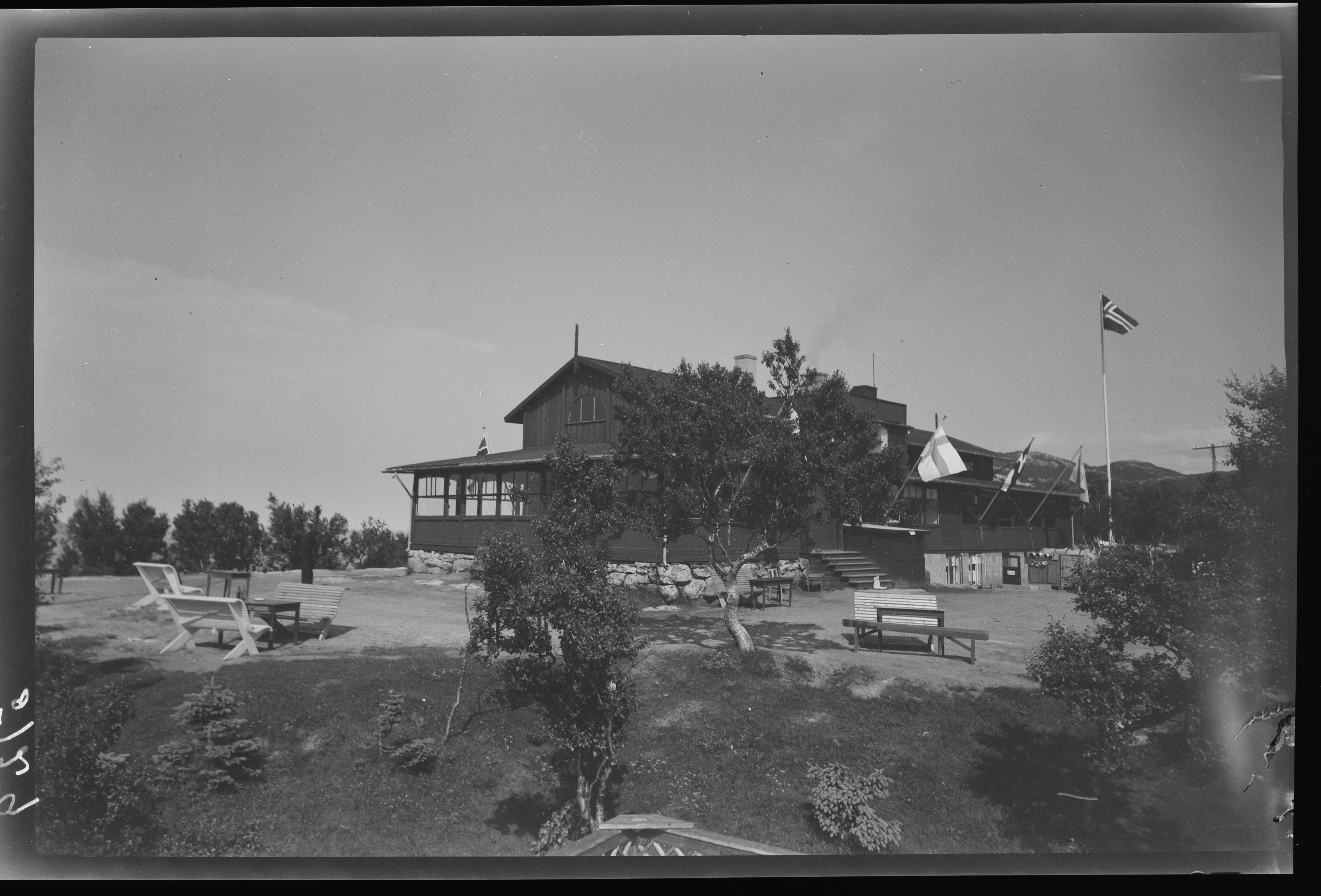 Bildet er hentet fra Nasjonalbibliotekets bildesamling. Anmerkninger til bildet var: Fotograf : ukjent Rønvikfjellet, Bodø, Nordland